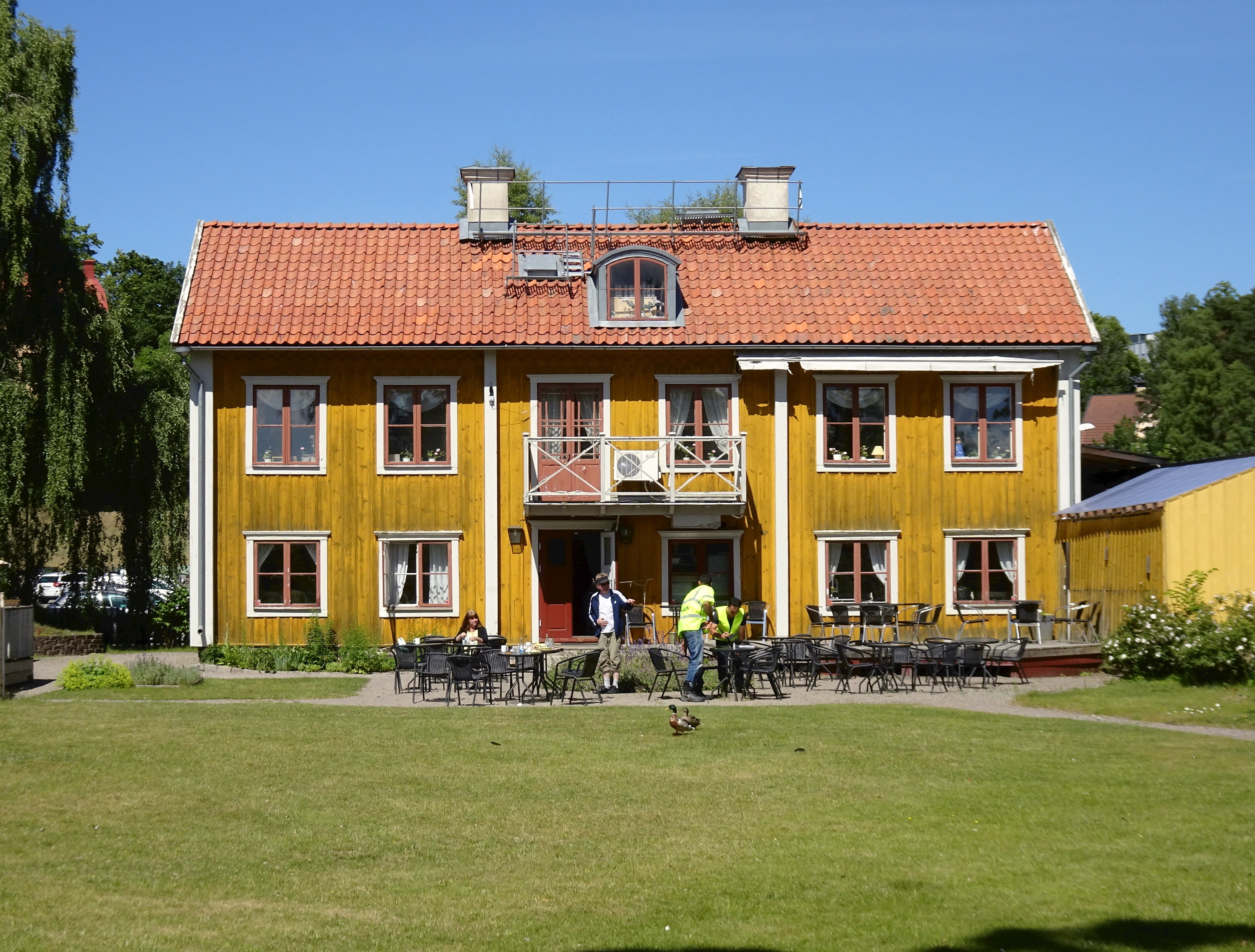 Wendela Hebbes hus, museum och restaurang